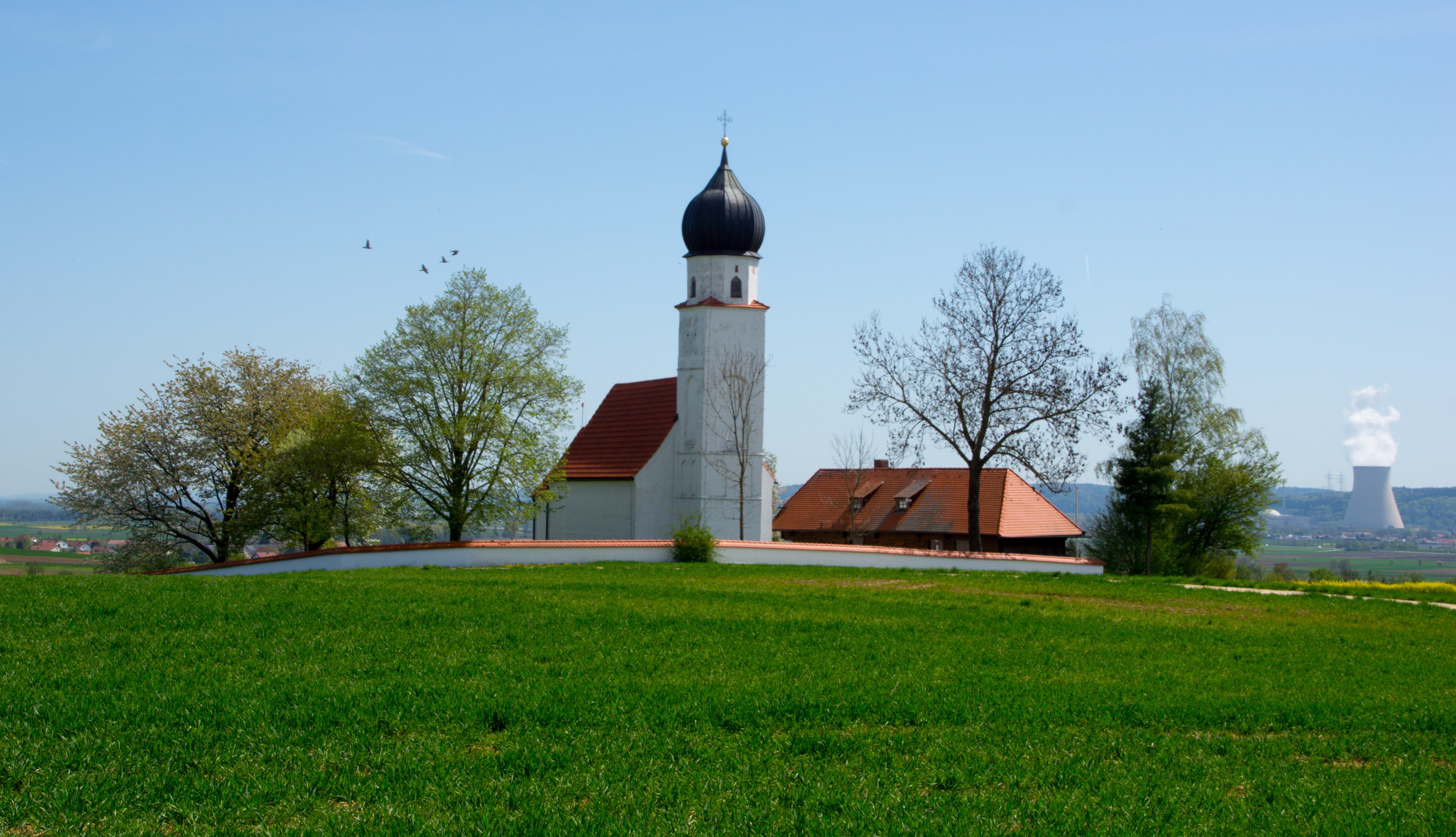 Kapelle St. Wolfgang bei Essenbach